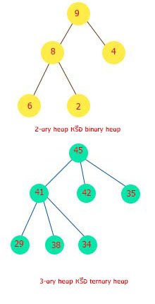 ดี-ฮีป